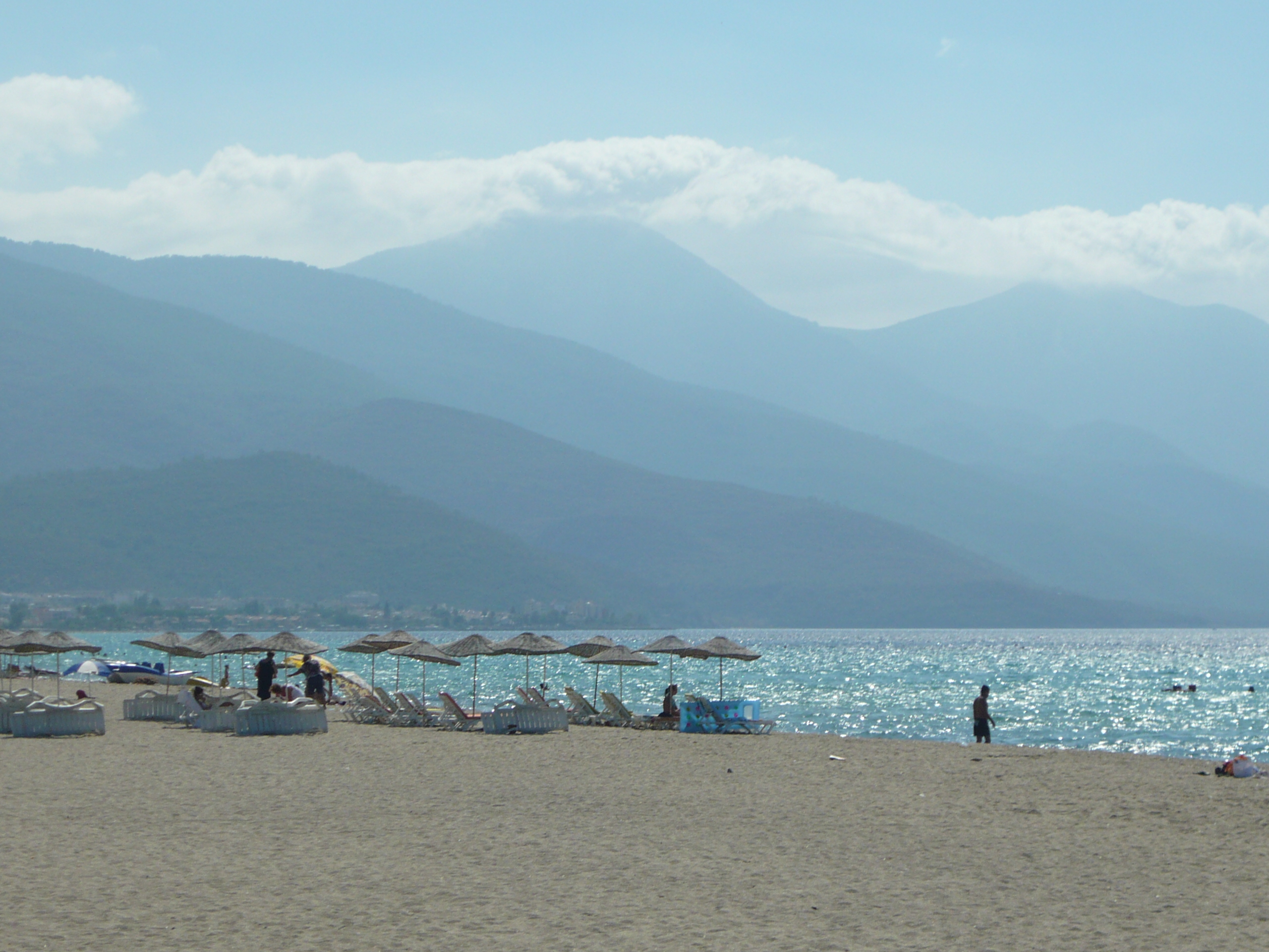 Davutlar